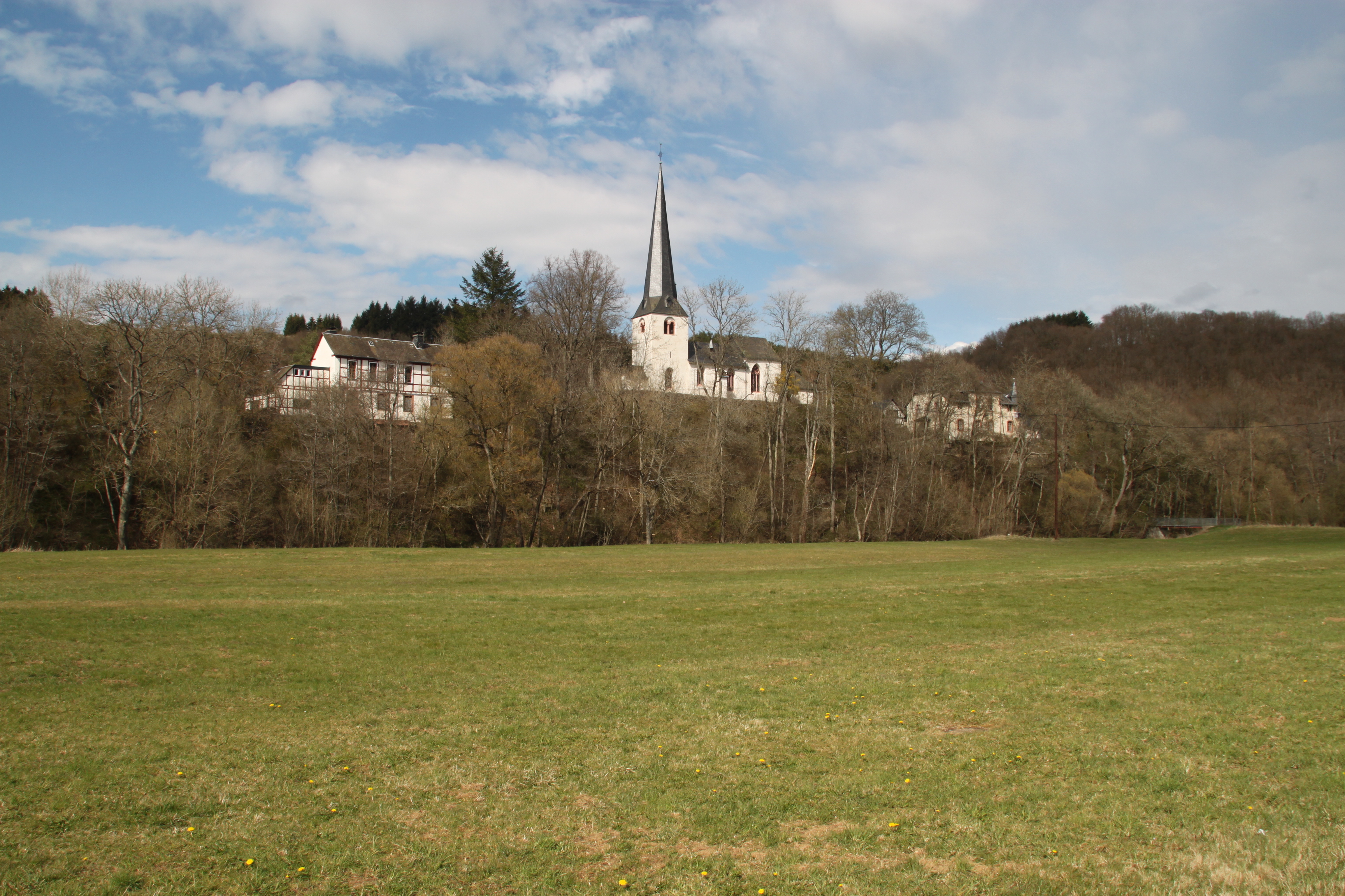 Wirft-Kirmutscheid mit kath. Pfarrkirche St. Wendalinus